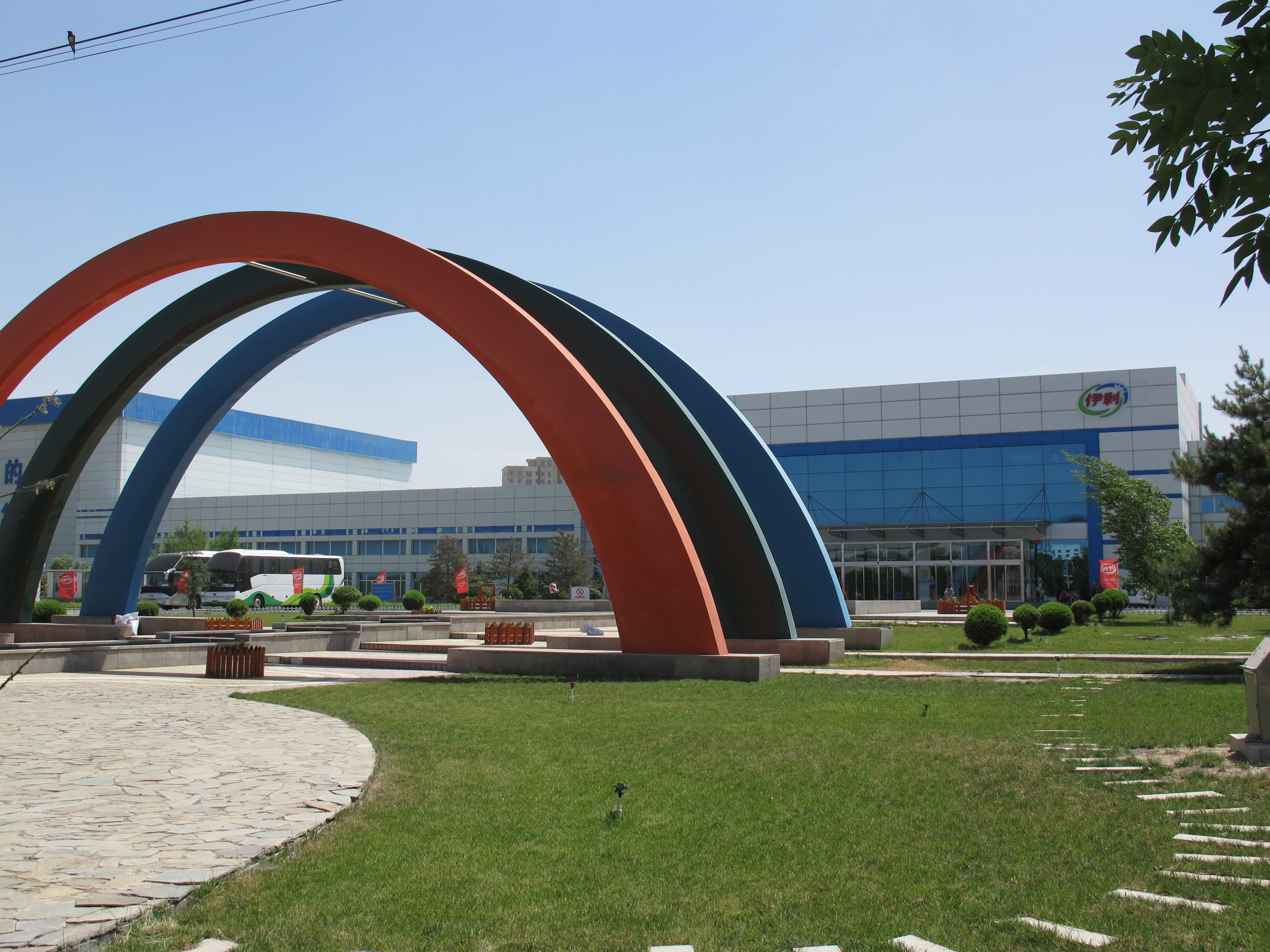 呼和浩特-伊利